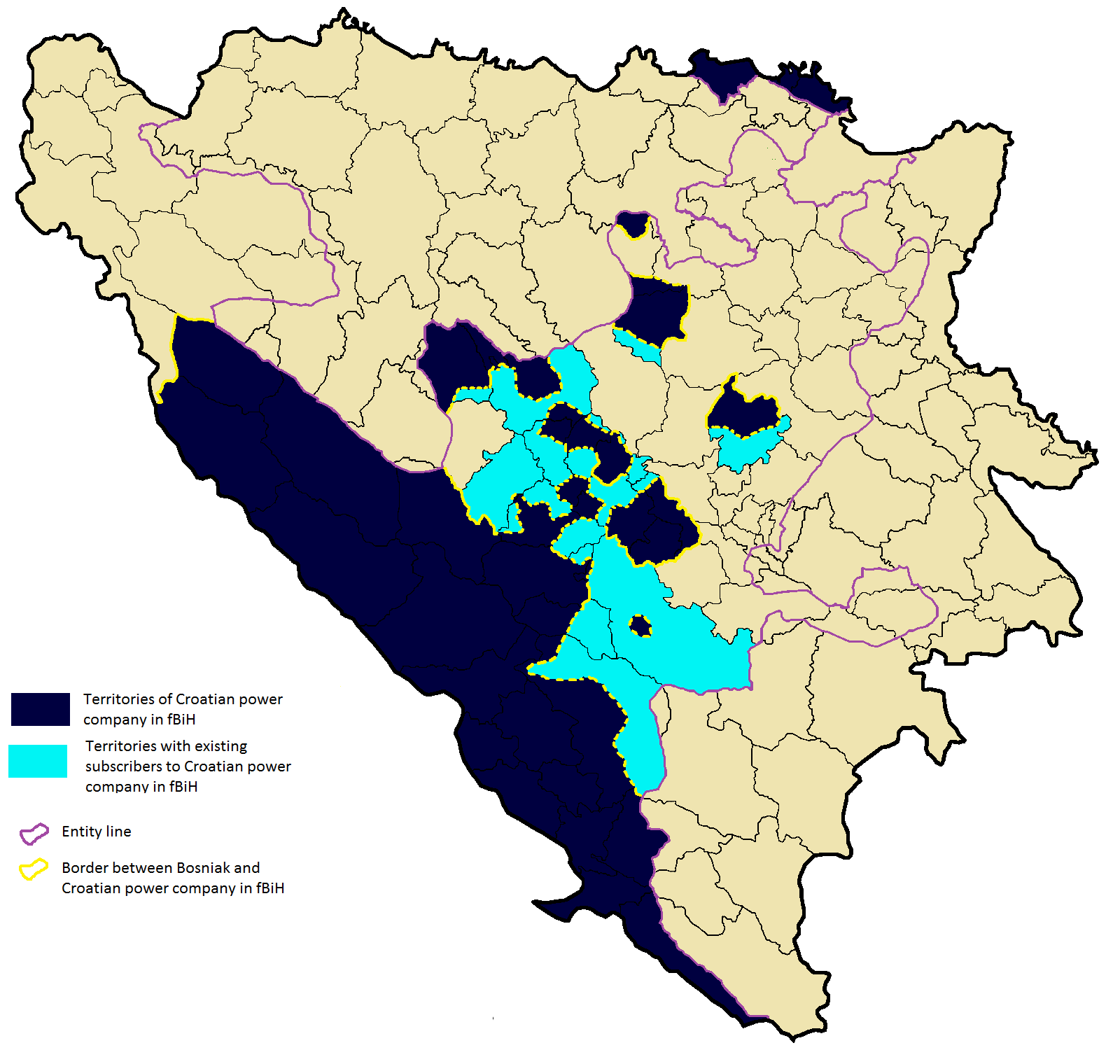 Područje rada hrhb elektroprivrede Izvor